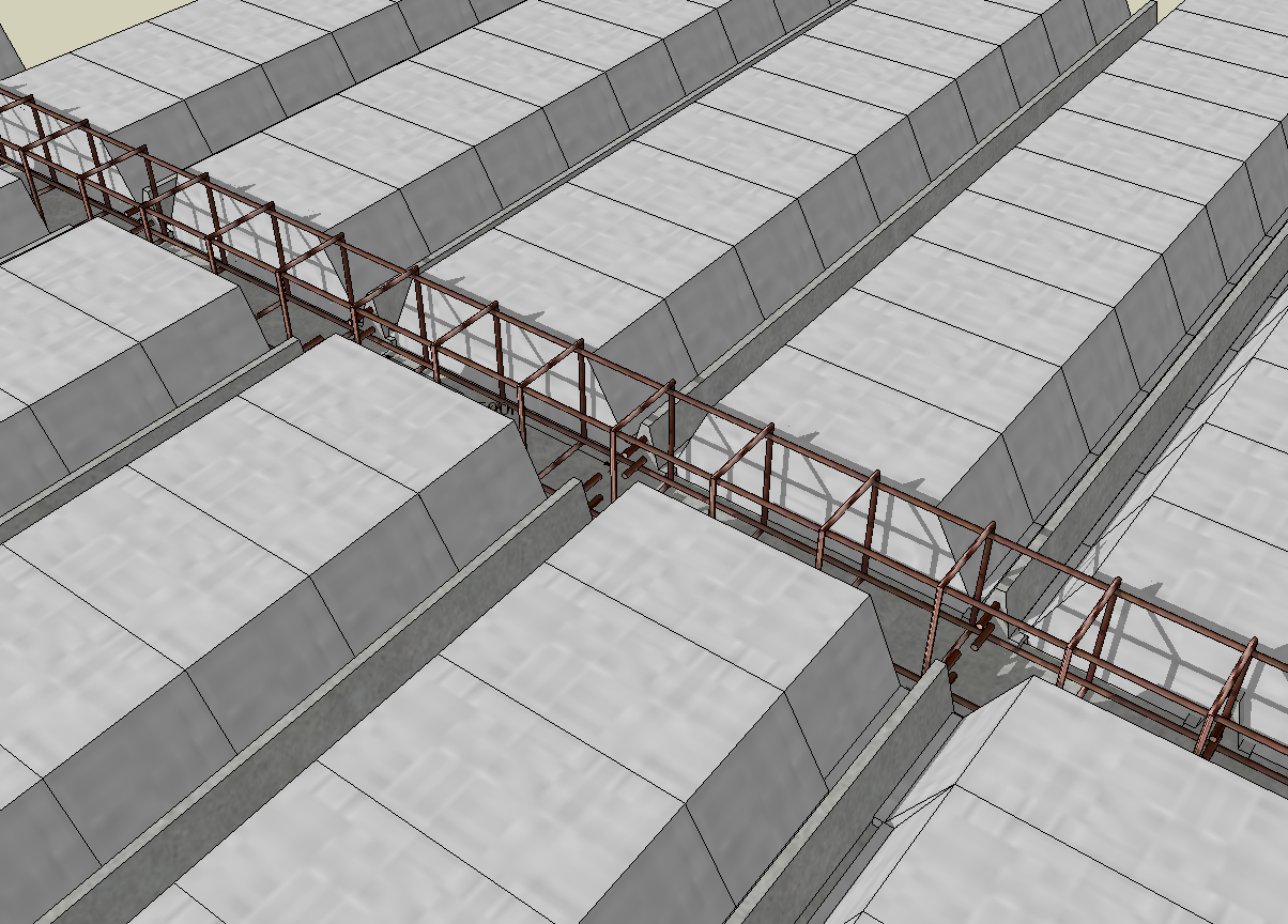 Plancher béton avec poutrelles, ourdies & chainage